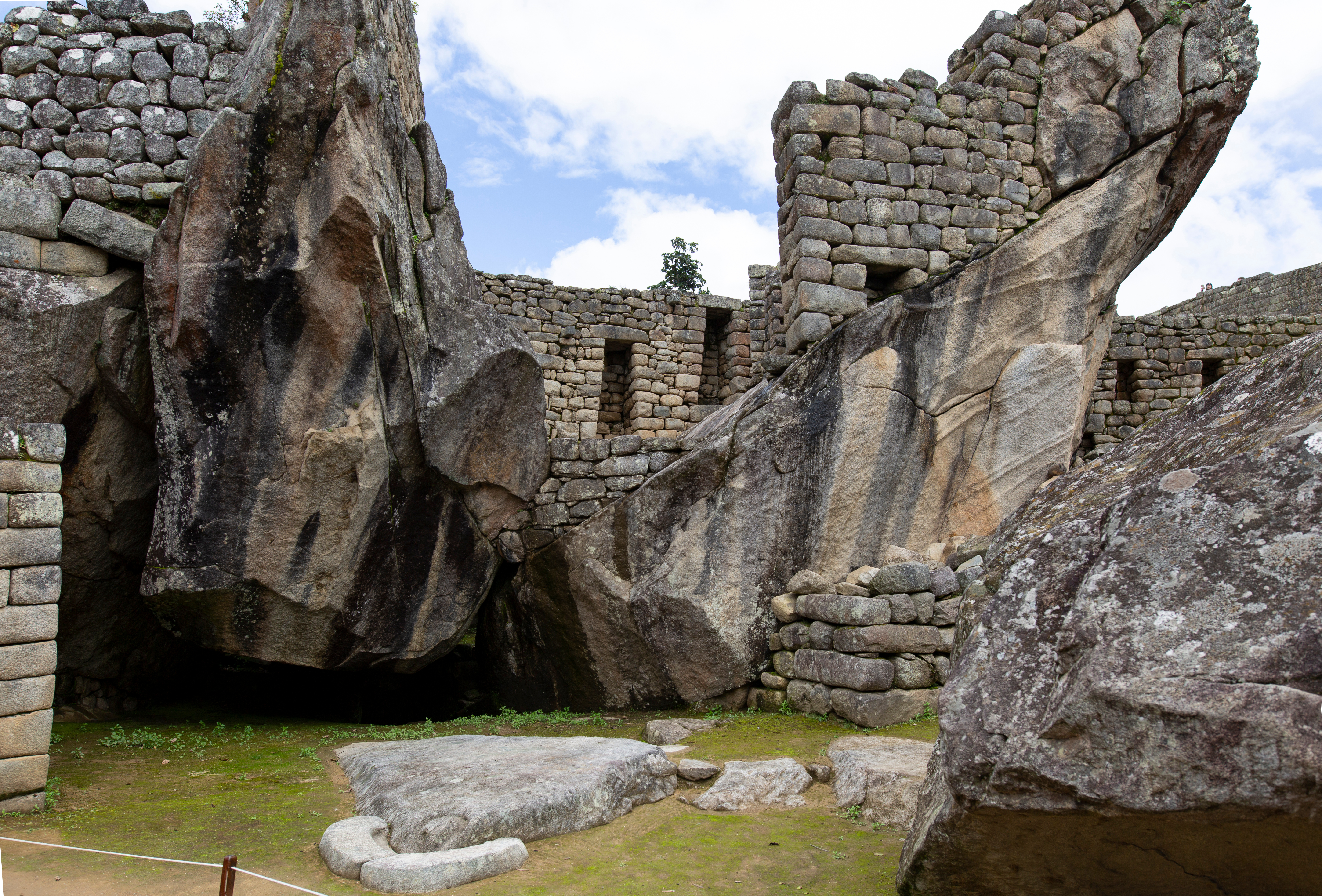 Supplice du Condor